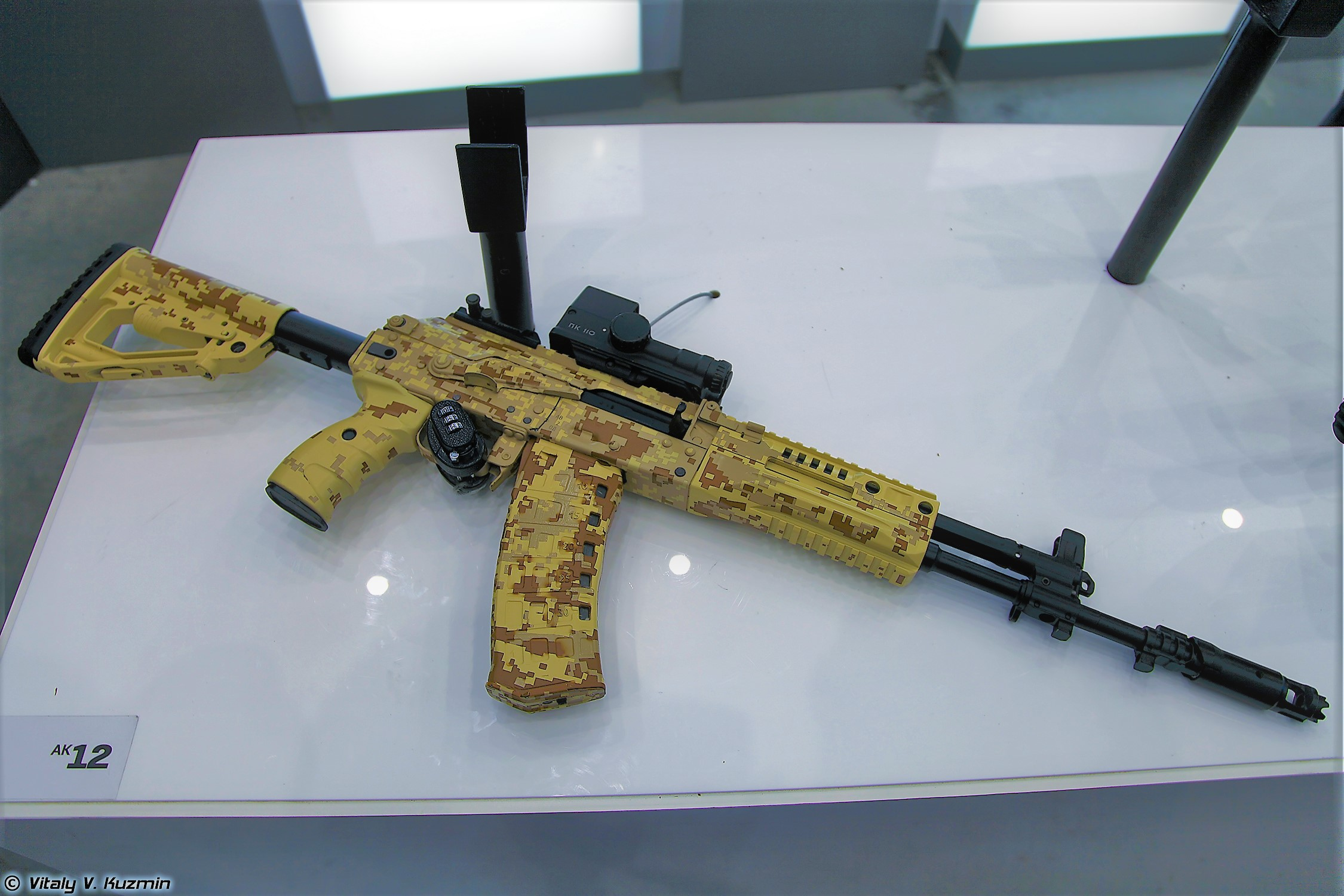 5,45х39 автомат АК-12 6П70